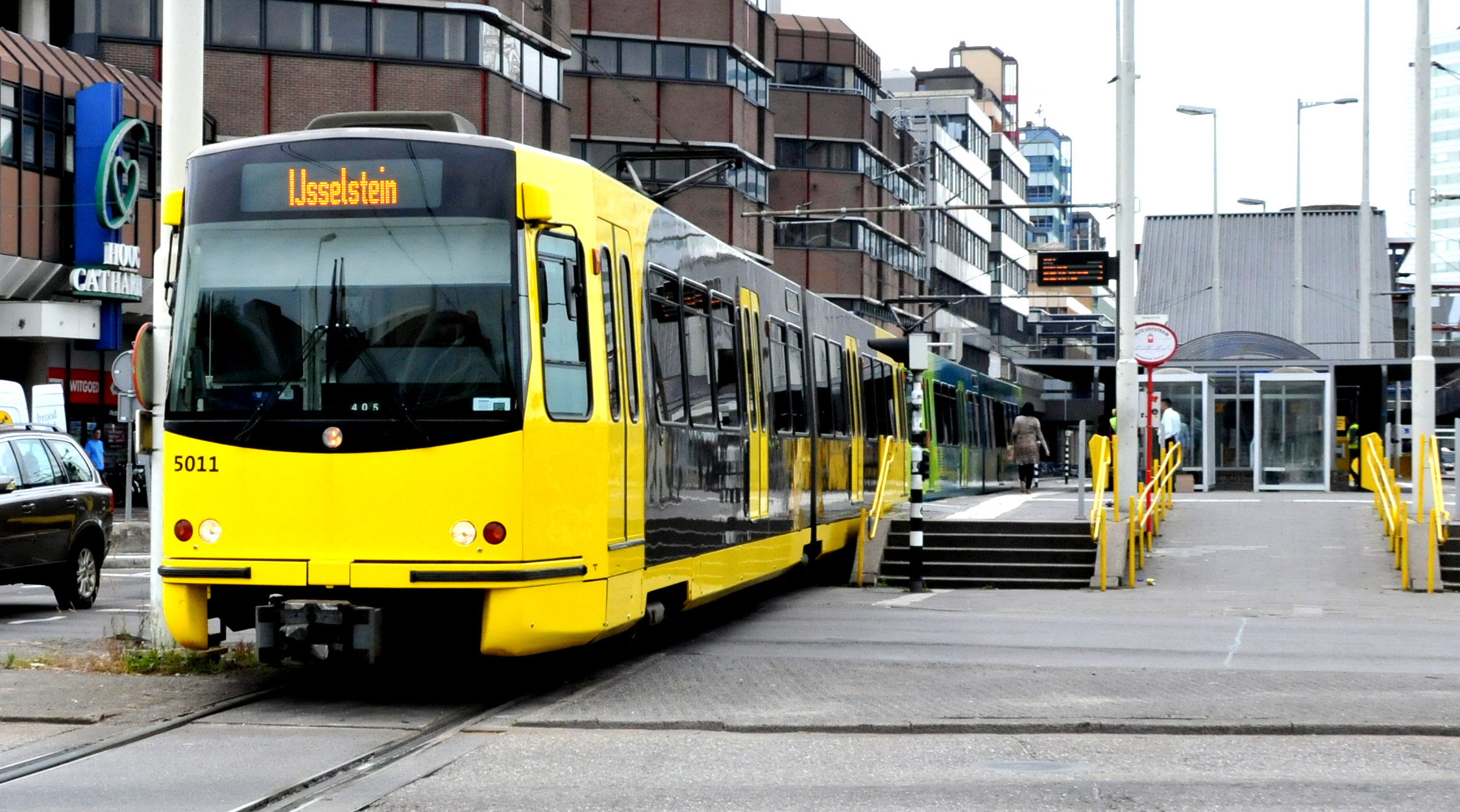 BRU tram 5011 te Utrecht halte CS. Deze halte werd per 18 april 2013 opgeheven en opgebroken.